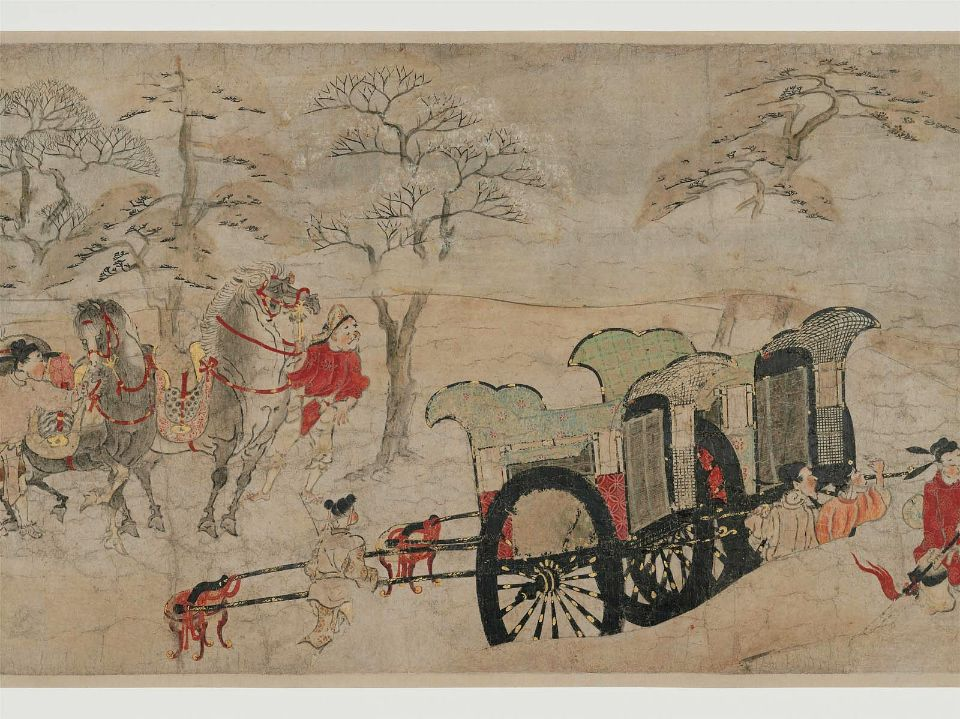 Rouleau 1, chars et fonctionnaires chinois